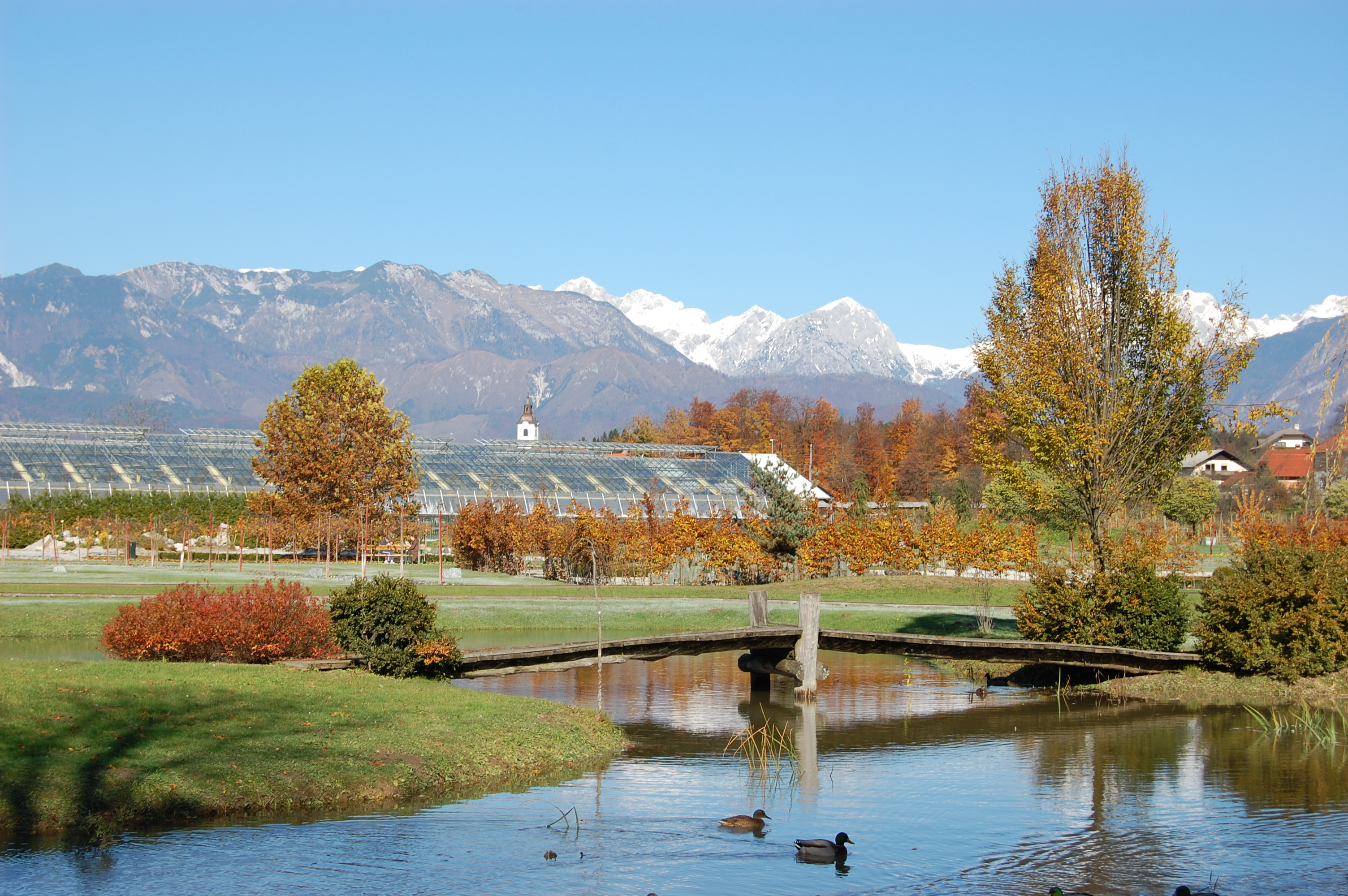 Arboretum Volcji Potok